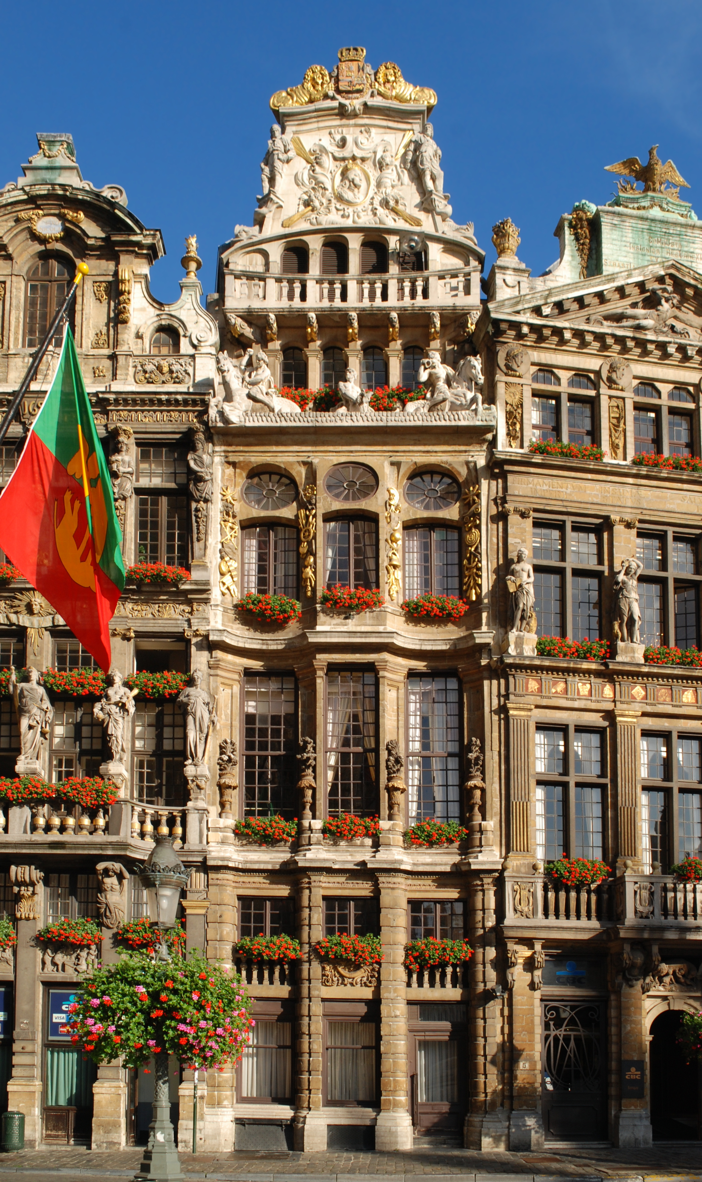 Belgique - Bruxelles - Maison du Cornet